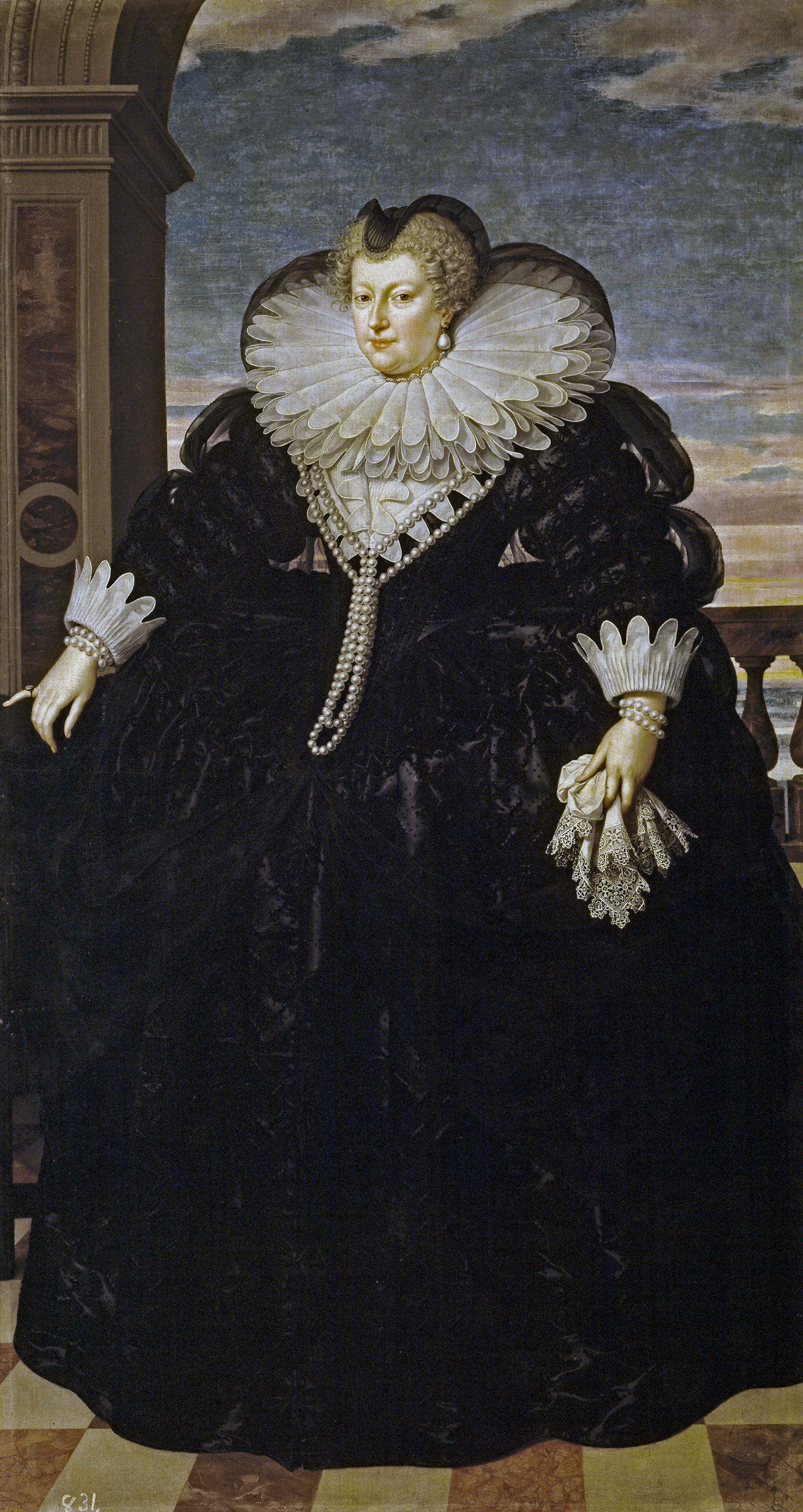 Retrato de la reina María de Médici (1575-1642), que fue reina consorte de Francia por su matrimonio con el rey Enrique IV de Francia y era hija de Francisco I de Médici, gran duque de Toscana, y de Juana de Habsburgo-Jagellón.